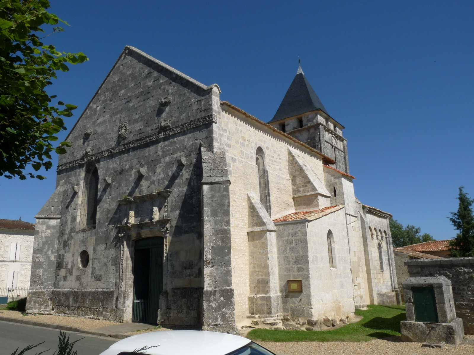 Eglise de Clion, Charente-Maritime, France